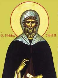 Беларуская (тарашкевіца): Яфрэм Смаленскі